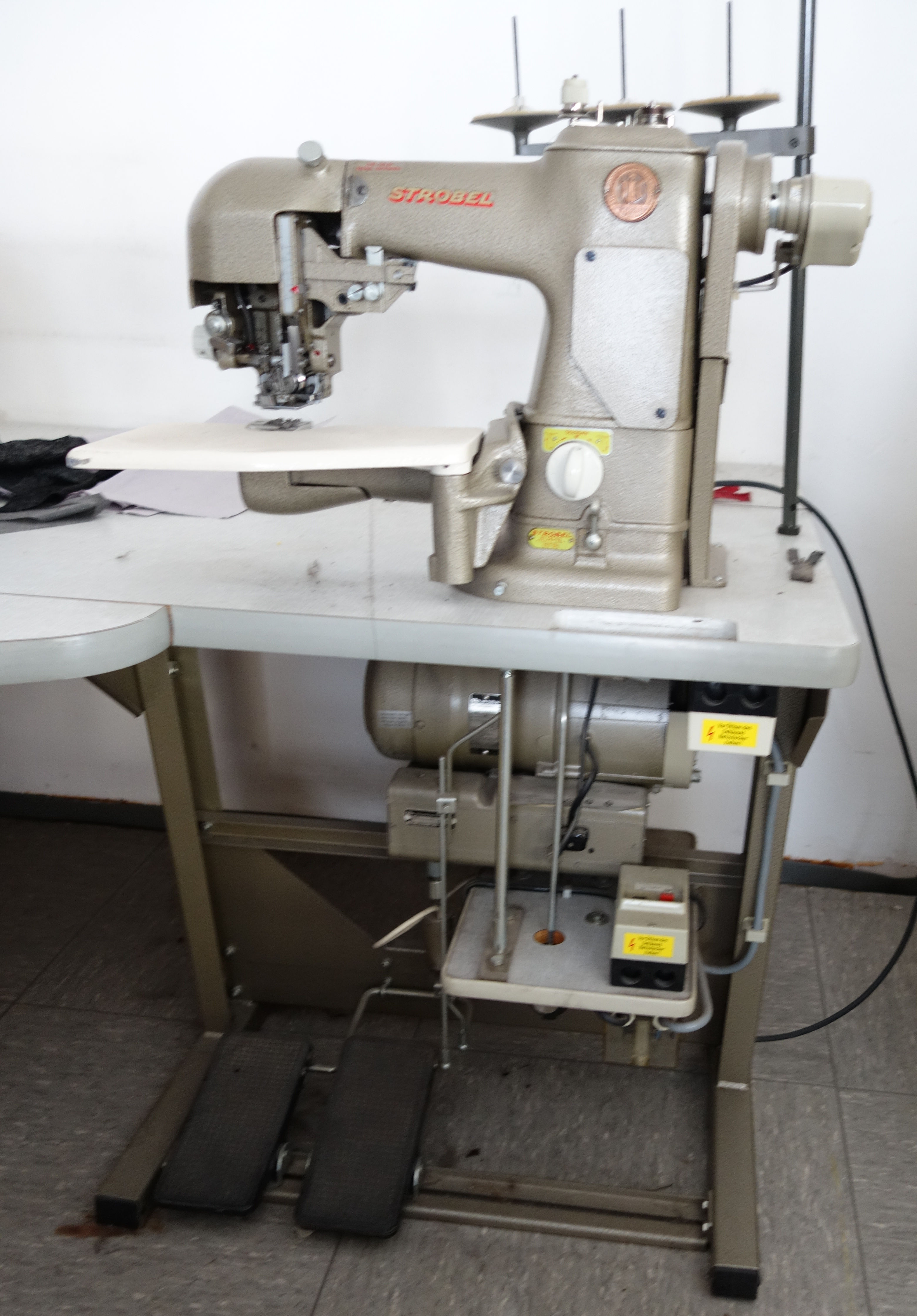 Staffiermaschine, Modell Strobel (zum Einarbeiten, Füttern von Textilfuttern in Pelzbekleidung). Gesehen bei Biel Pelze, Bad Hersfeld, Badestube 6, nach der Geschäftsaufgabe.